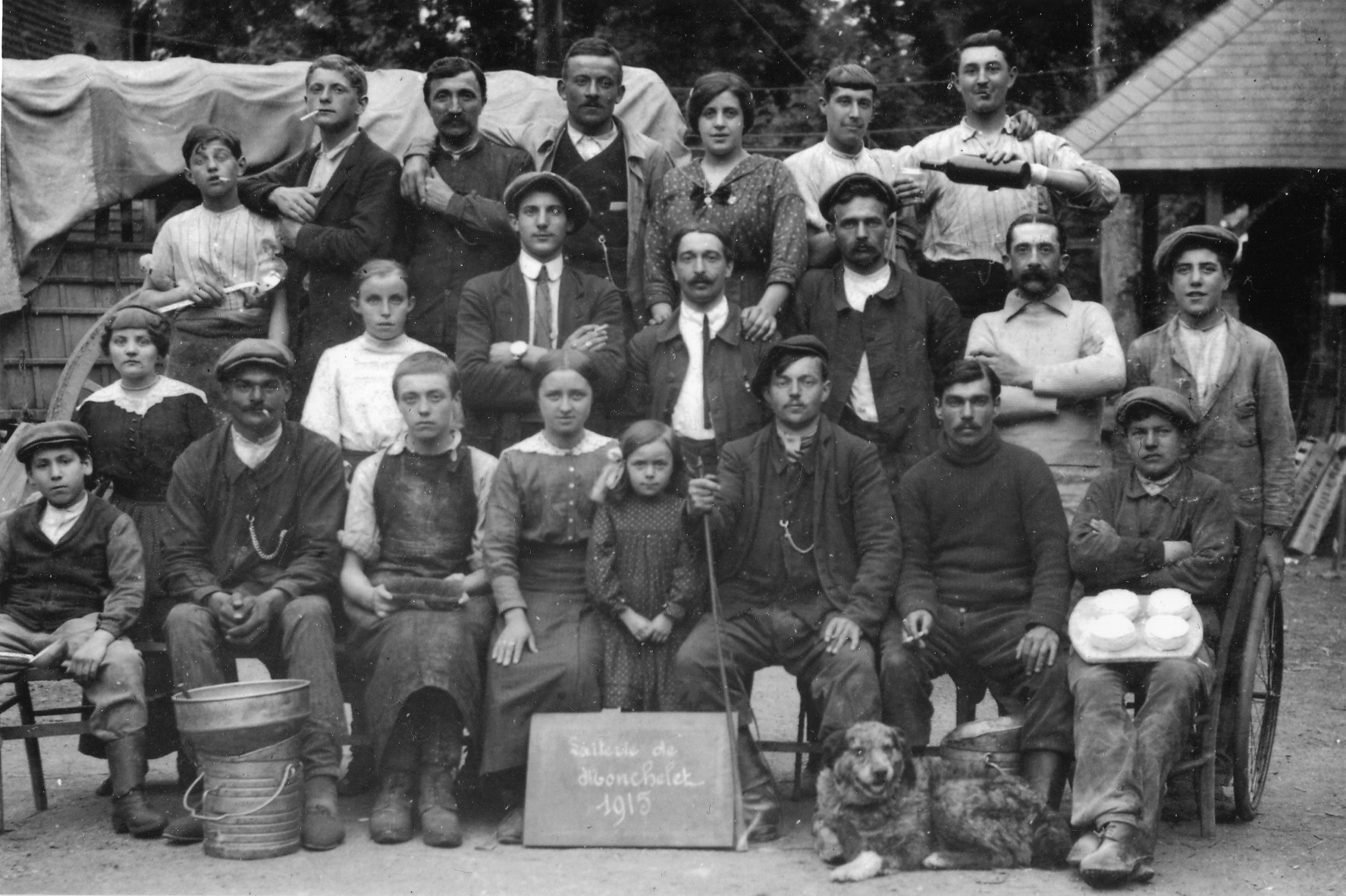 Maisnières (Somme, France). Photo de groupe : Personnel de la laiterie de Monchelet en 1915 (21 salariés)